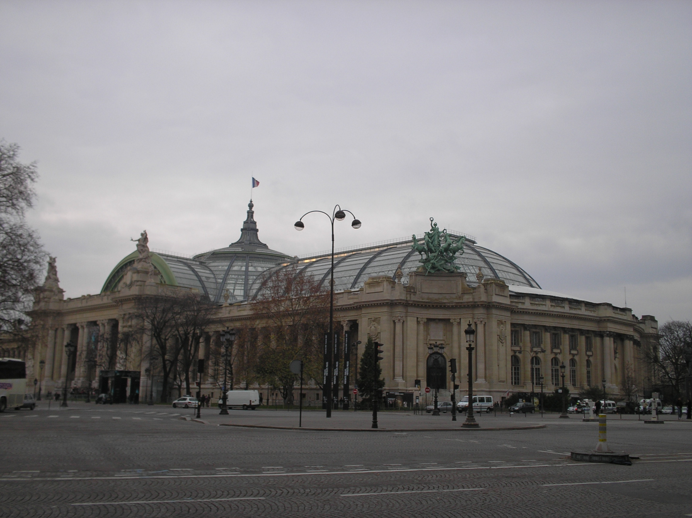 Vue sur le côté du Grand palais à Paris